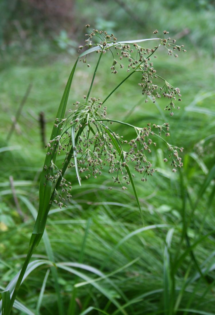 Gewöhnliche Waldbinse (Scirpus sylvaticus), Sauergräser (Cyperaceae) - Österreich/Austria/Autriche: Oberösterreich, Hausruckviertel, Kien NW Attnang-Puchheim